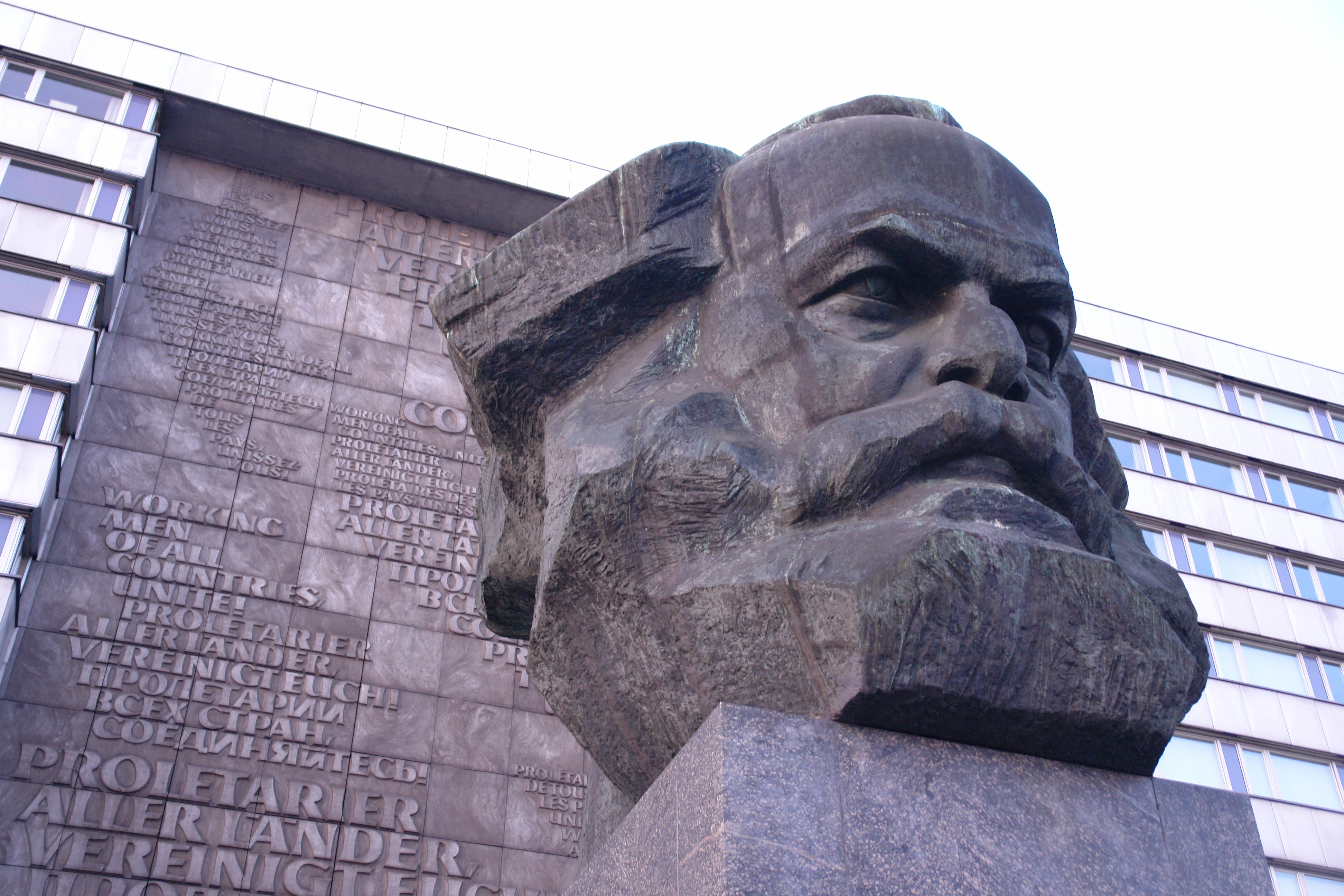 "Nischel"